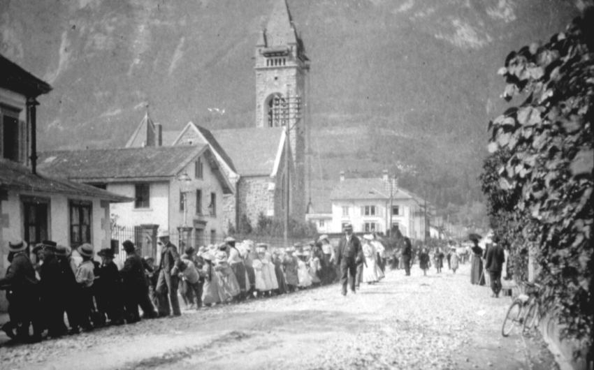 Bahnhofstrasse Walenstadts um 1905